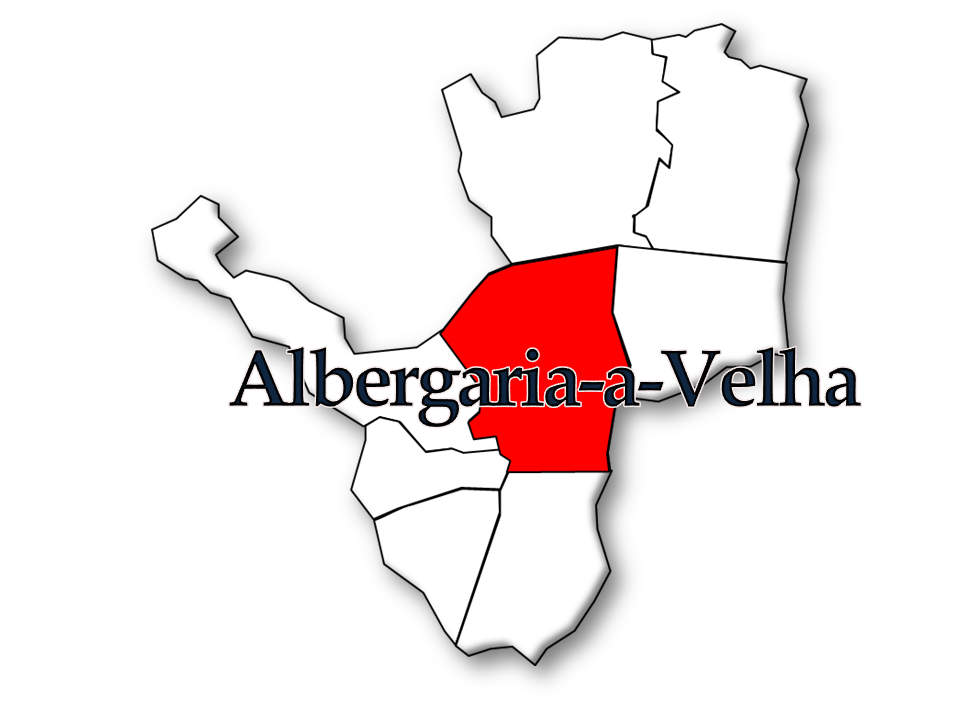 Censos 1864/2011